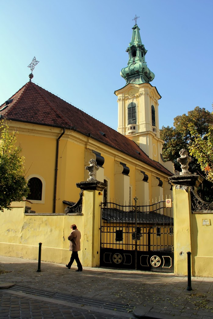 Pesti szerb templom